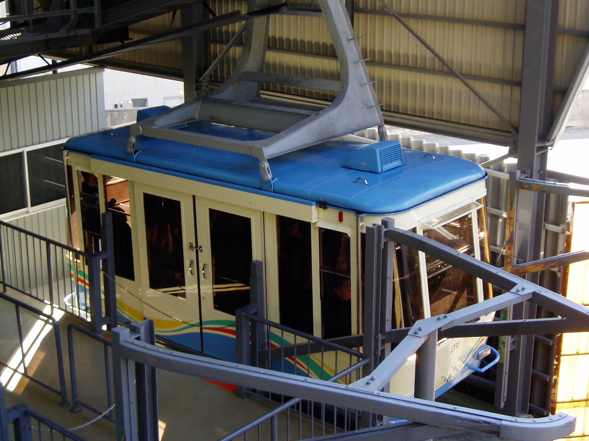 Matsuyamajo Ropeway.